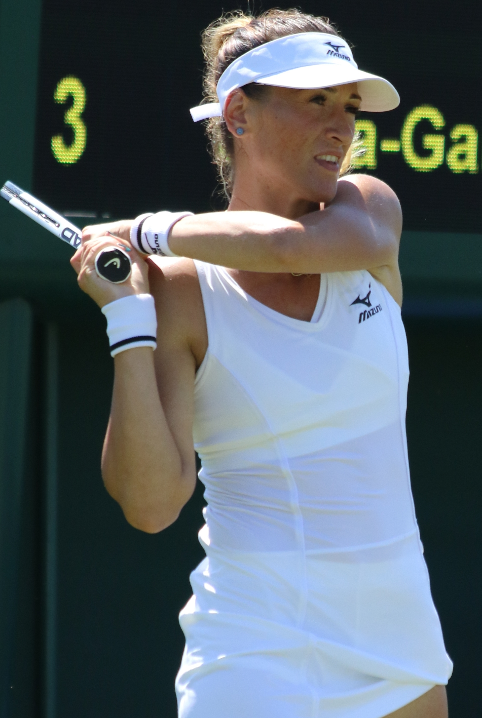 Cadantu WMQ18 (16)